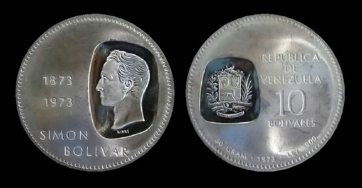 Doblom venezolano "CENTENARIO DE LA EFIGIE DEL LIBERTADOR EN LA MONEDA". •Composición: Ley 900 (90% Plata, 10% Cobre) •Peso: 30,0000 Gramos •Diámetro: 39,000 mm •Espesor: 3,040 mm